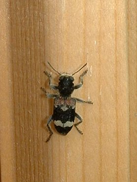 Clerus mutillarius photo by Jeffdelonge Vantoux et Longevelle, 70700, France, Juin 2006